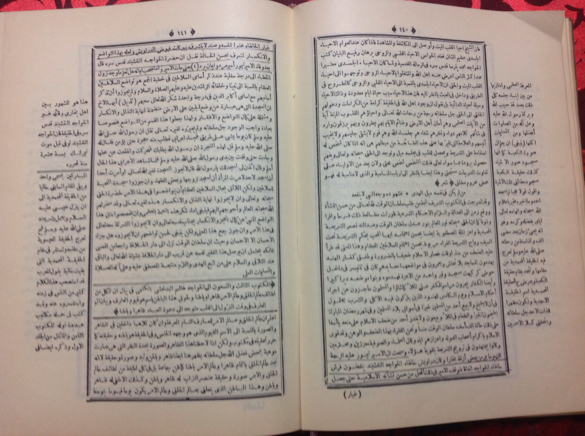 İmam-ı Rabbani'nin Mektubatında,Timur ile ilgili geçen metin.